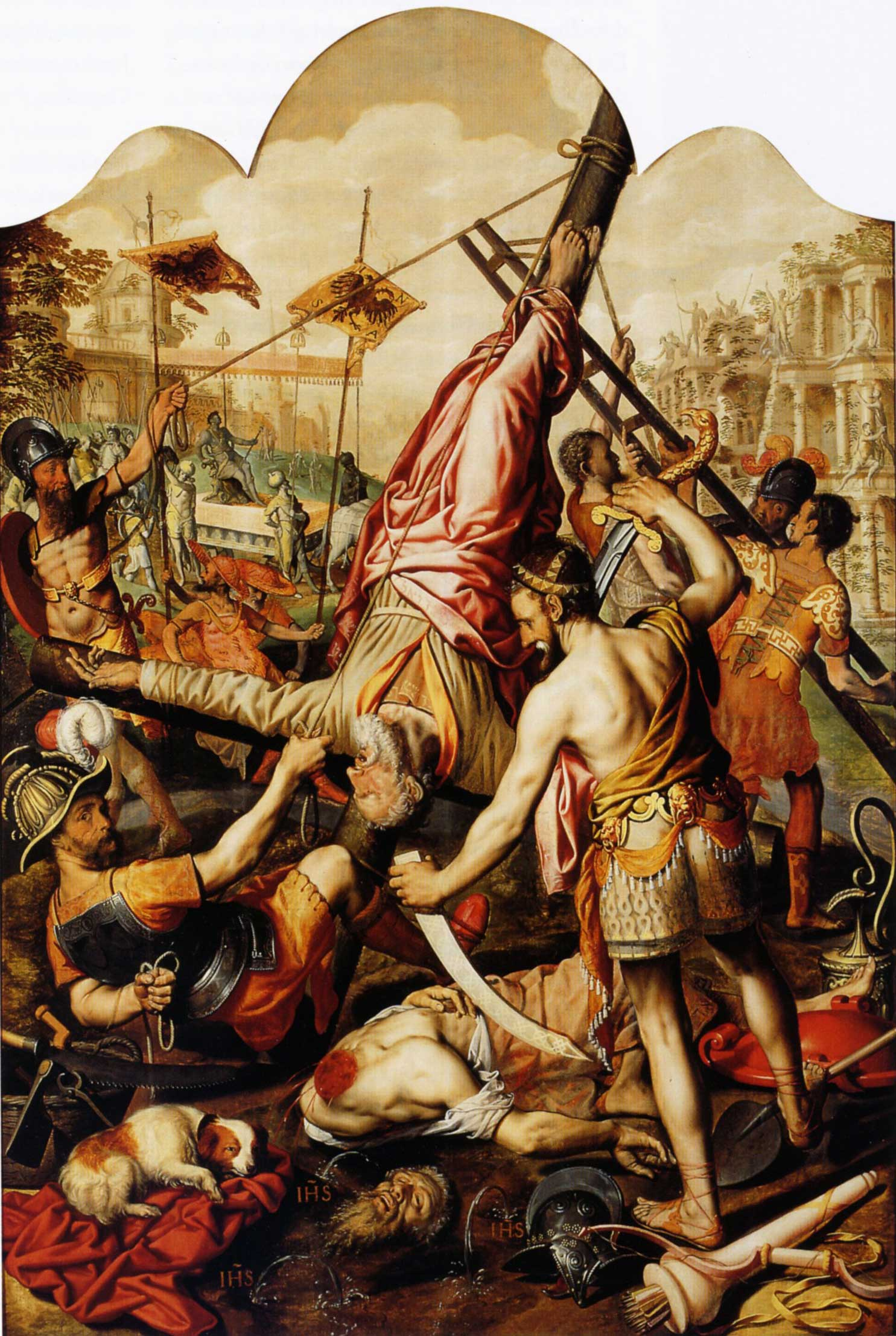 De dood van Petrus en Paulustitle QS:P1476,nl:"De dood van Petrus en Paulus" label QS:Lnl,"De dood van Petrus en Paulus"